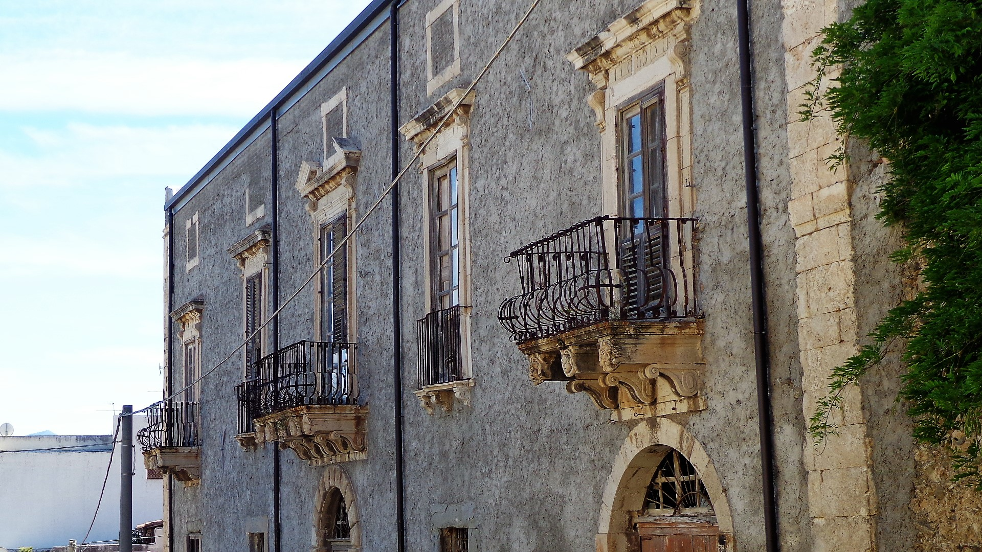 Palazzo dei Giurati